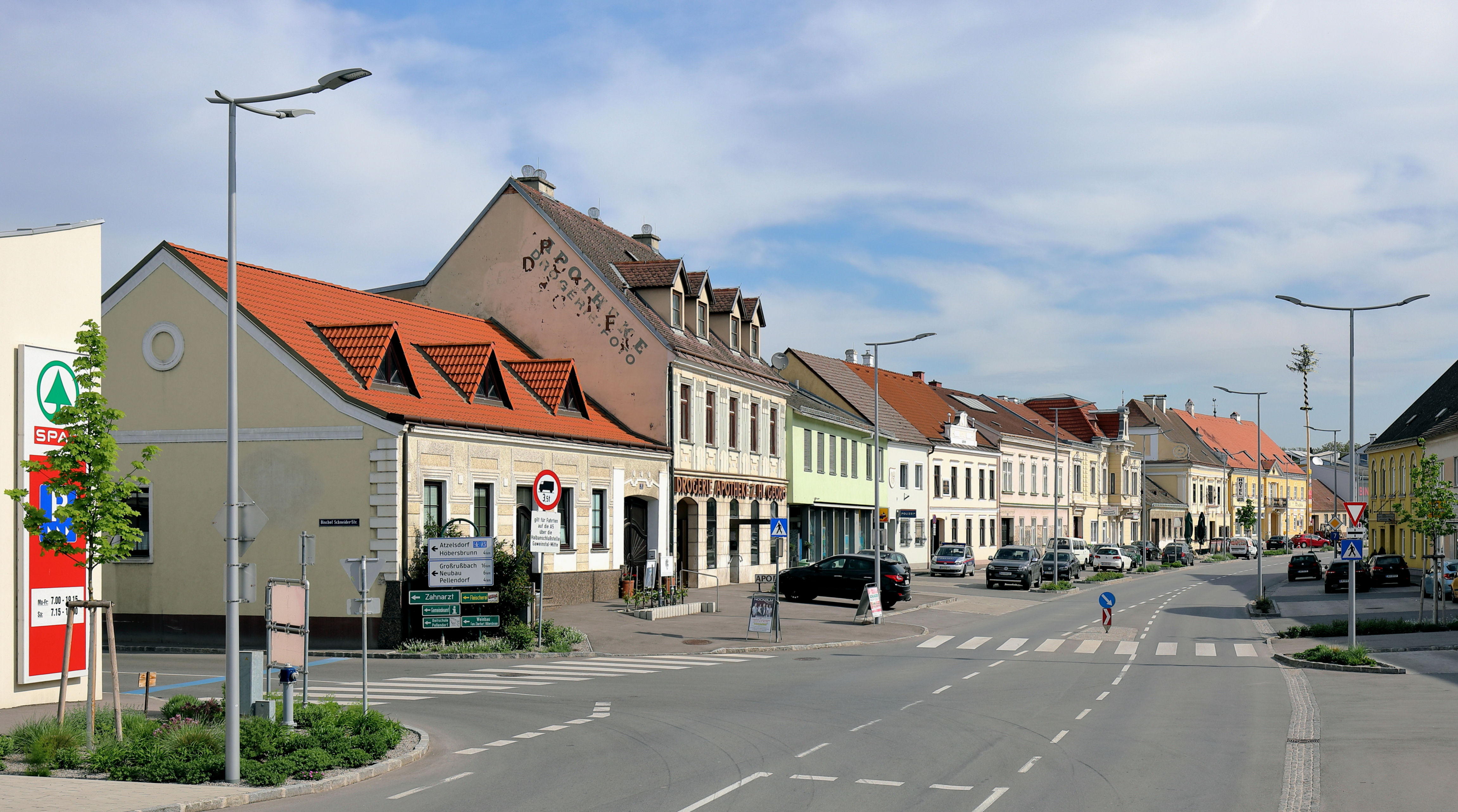 Der Hauptplatz der niederösterreichischen Marktgemeinde Gaweinstal.Links vom Maibaum das ehem. Posthaus (Hauptplatz 27) und das ehemalige Rathaus (Hauptplatz 29). Beide Gebäude sind denkmalgeschützt.